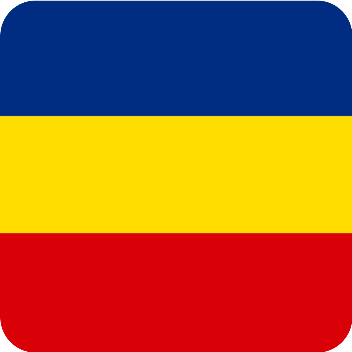 Icono de la bandera del Partido Republicano Social Cristiano, Costa Rica.